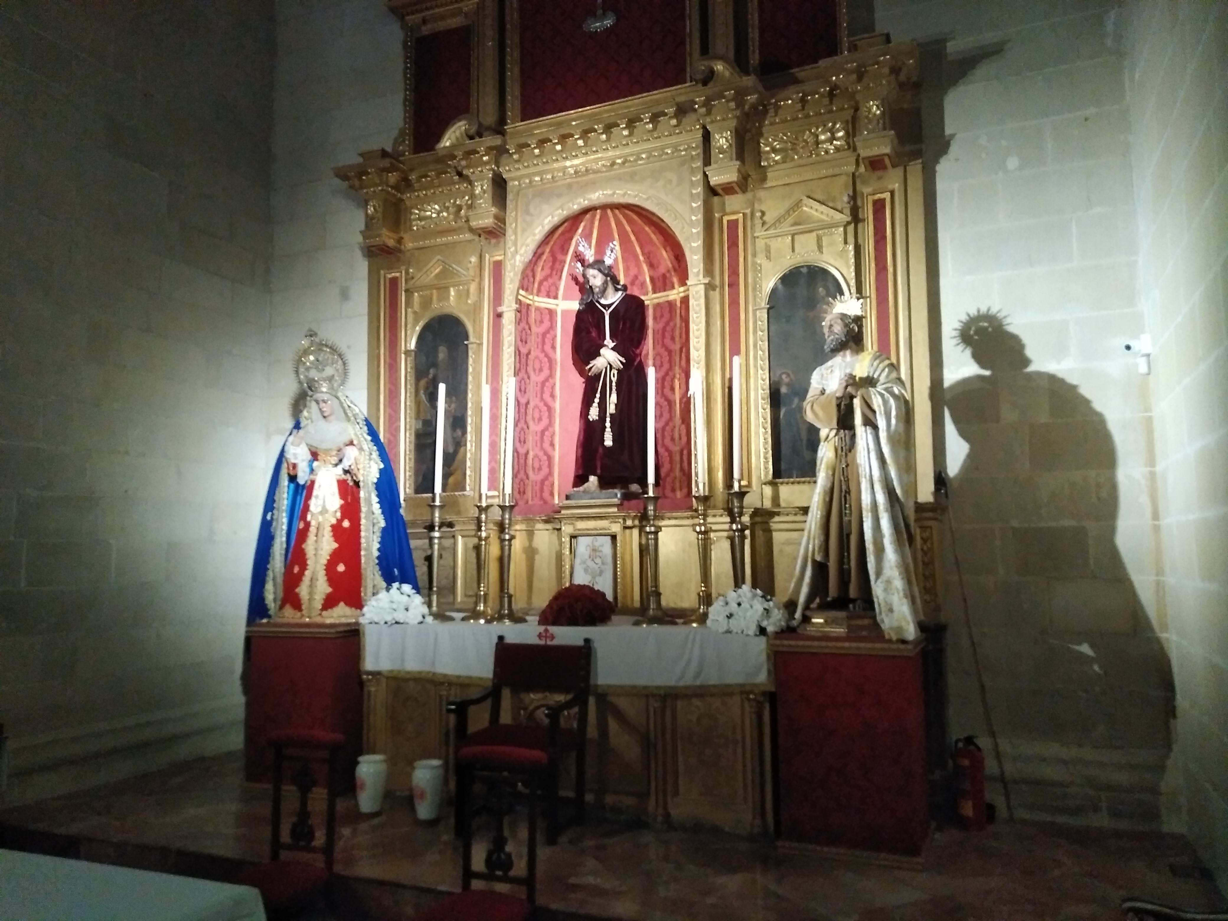 Imágenes de la Hermandad del Prendimiento en el Interior de la Iglesia de Santiago en Jerez de la Frontera (España)